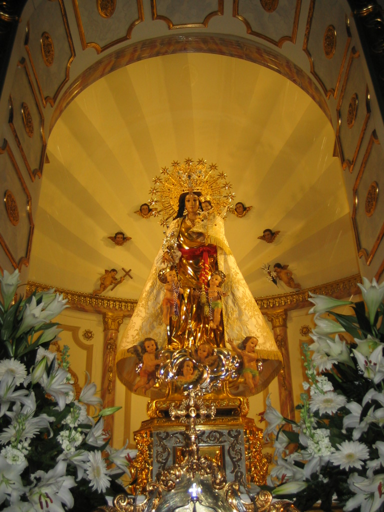 Imagen de la Virgen de los Desamparados, Desamparados, Orihuela.